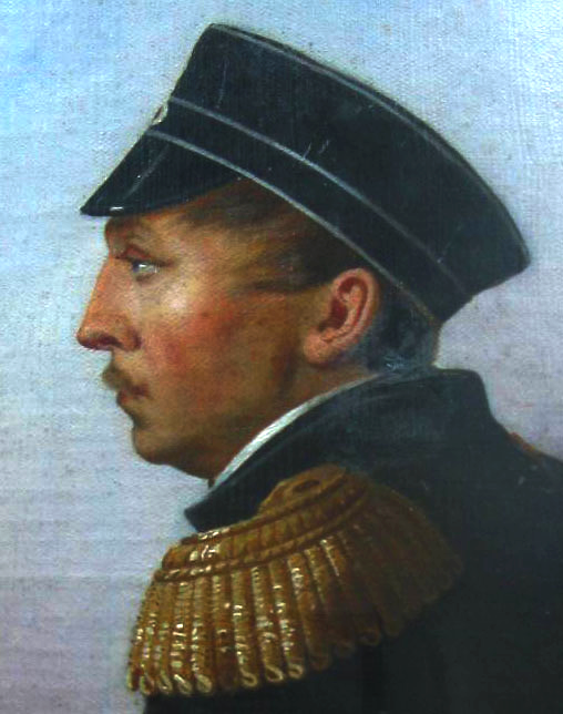 Pavel Nakhimov